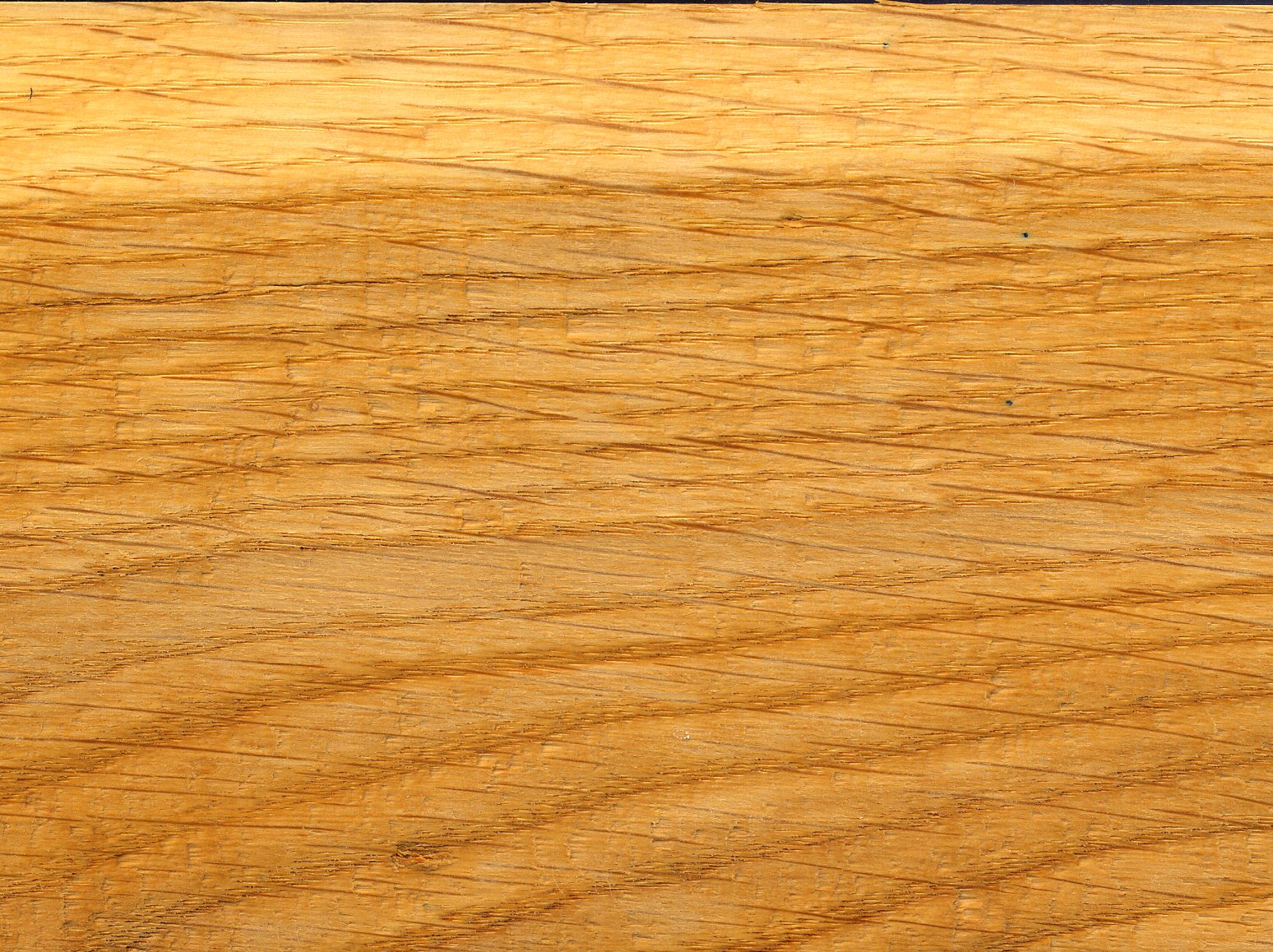 Quercus robur, przekrój promieniowy przez drewno dębu szypułkowego